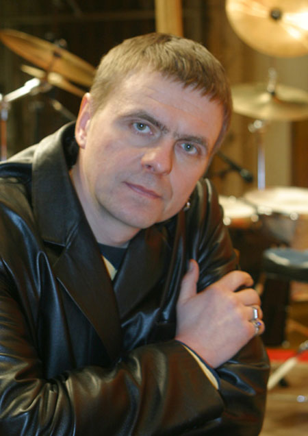 Алексей Шедько, концерт 2002 год